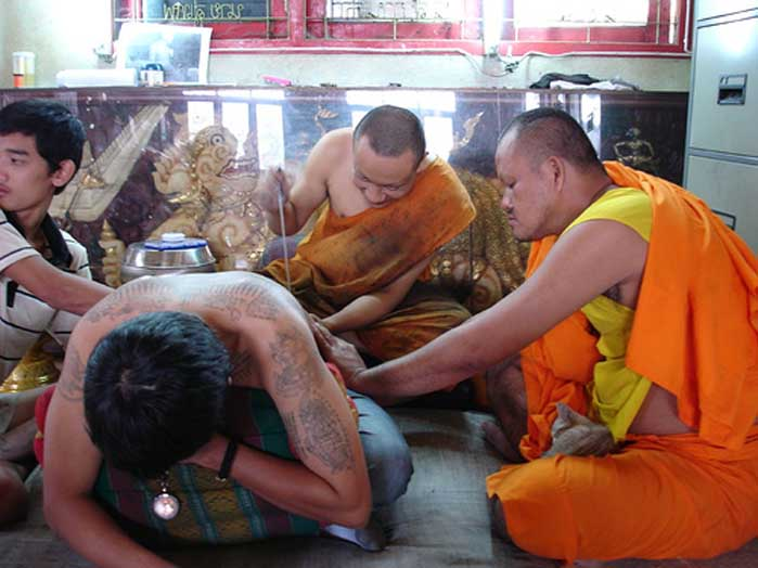 Hlwong Pi Nan tattooing Yant at Wat Bang Phra Temple